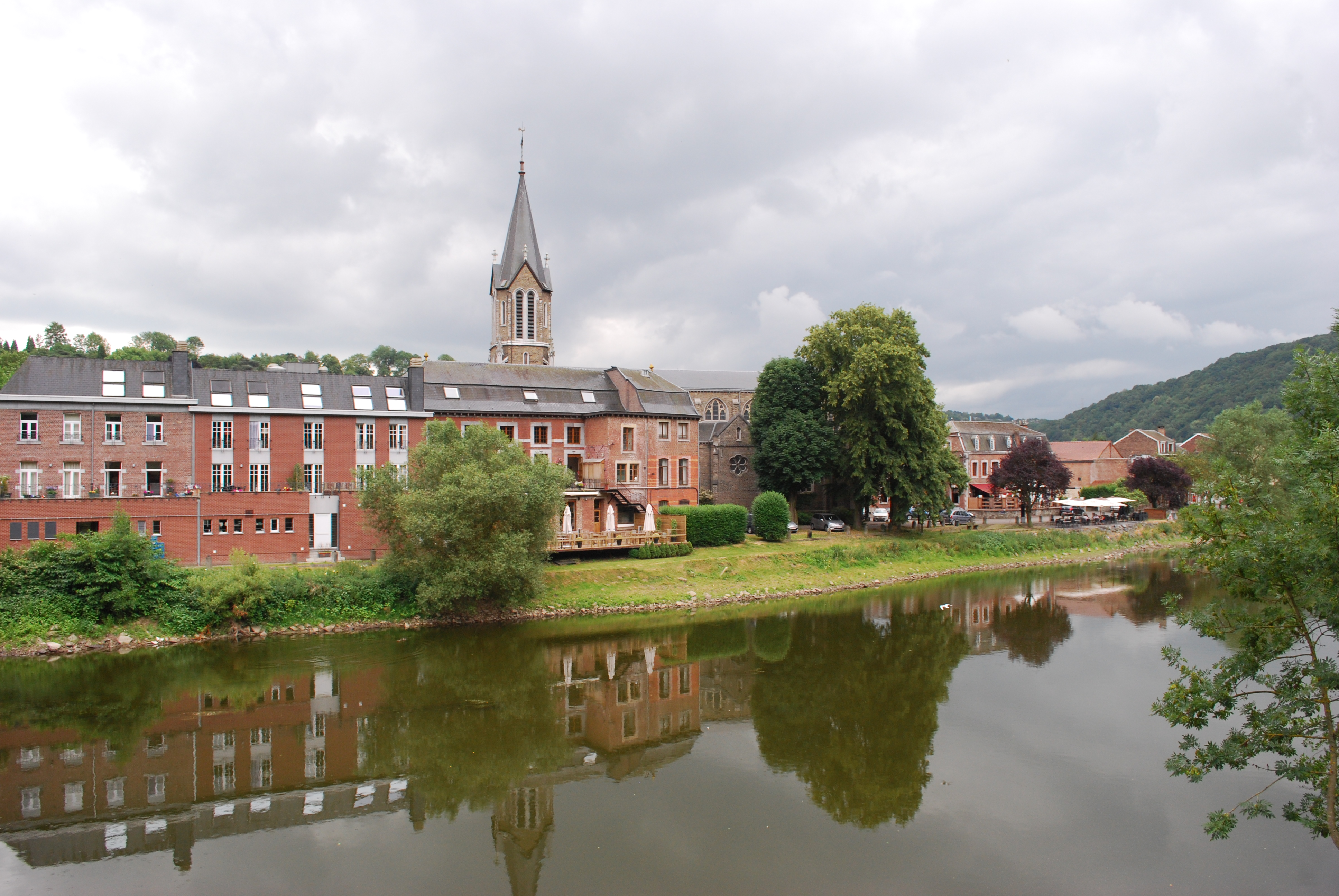 Tilff : vue vers la rive droite de l'Ourthe.